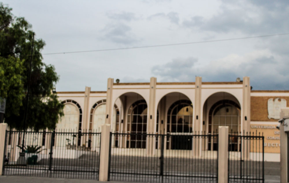 Ubicada en el norte de la ciudad de Saltillo.